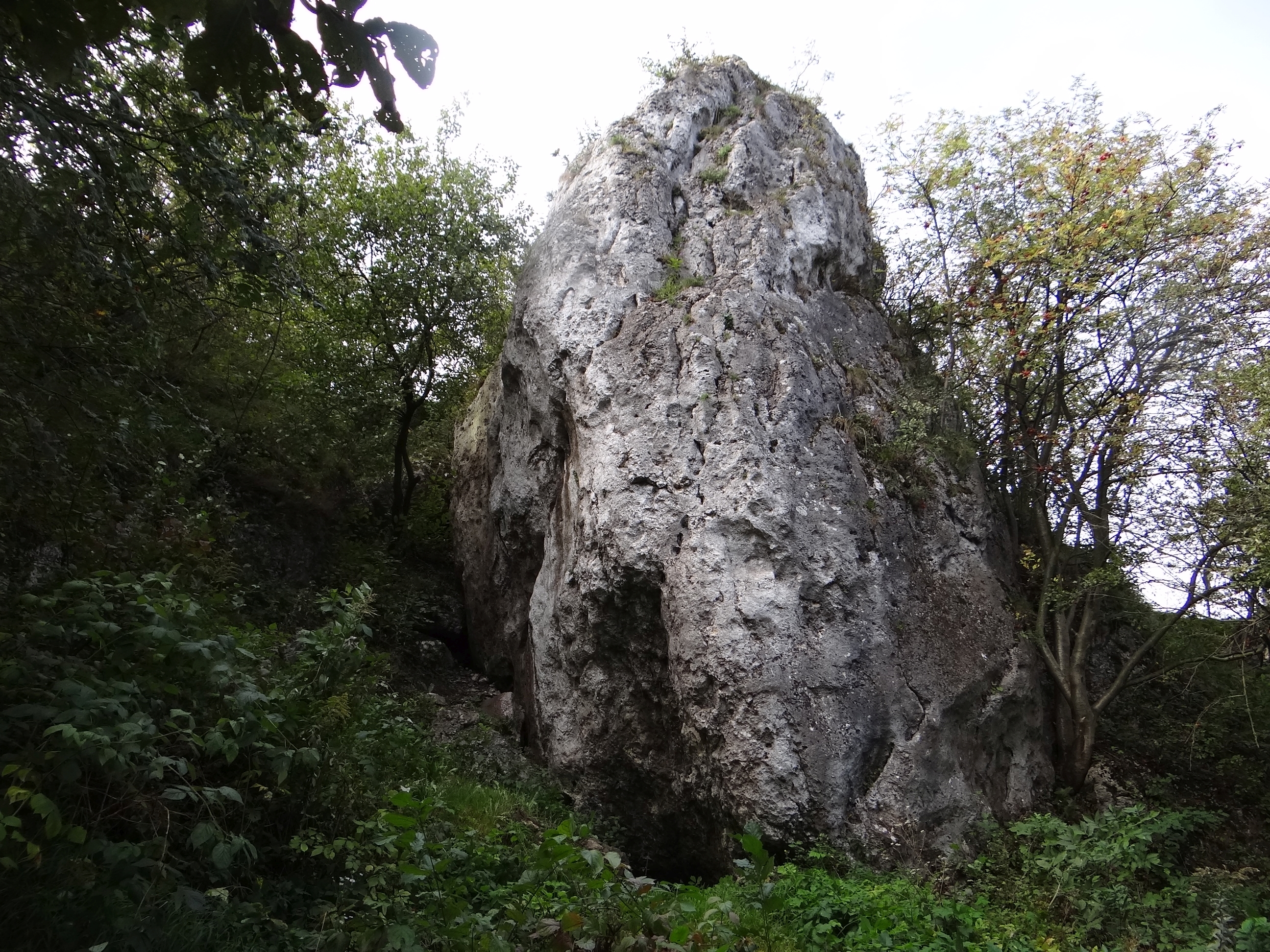 Żytnia Skała, ściana północna